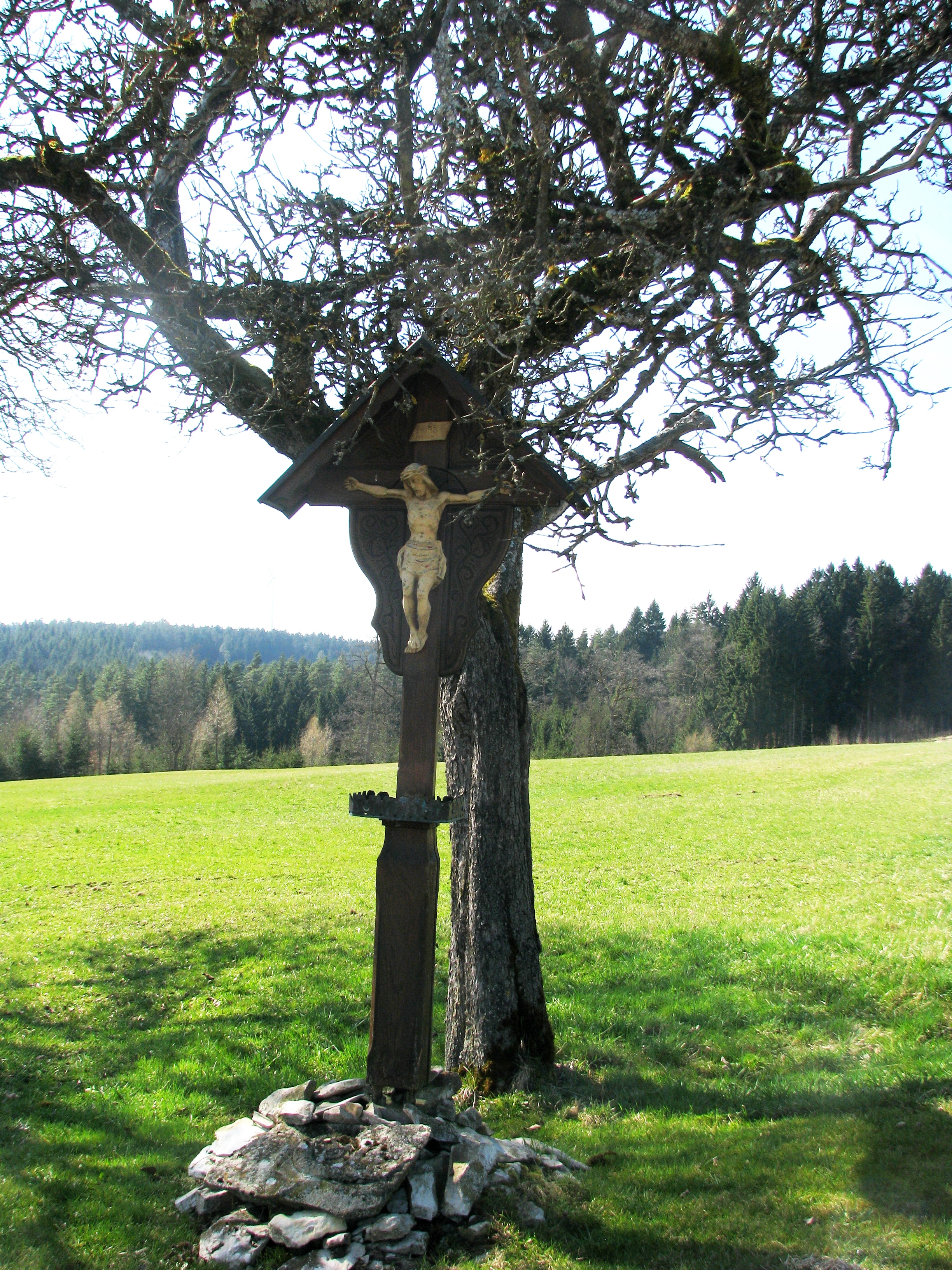 Thannbügl, Ortsteil von Deining im Landkreis Neumarkt in der Oberpfalz in Bayern